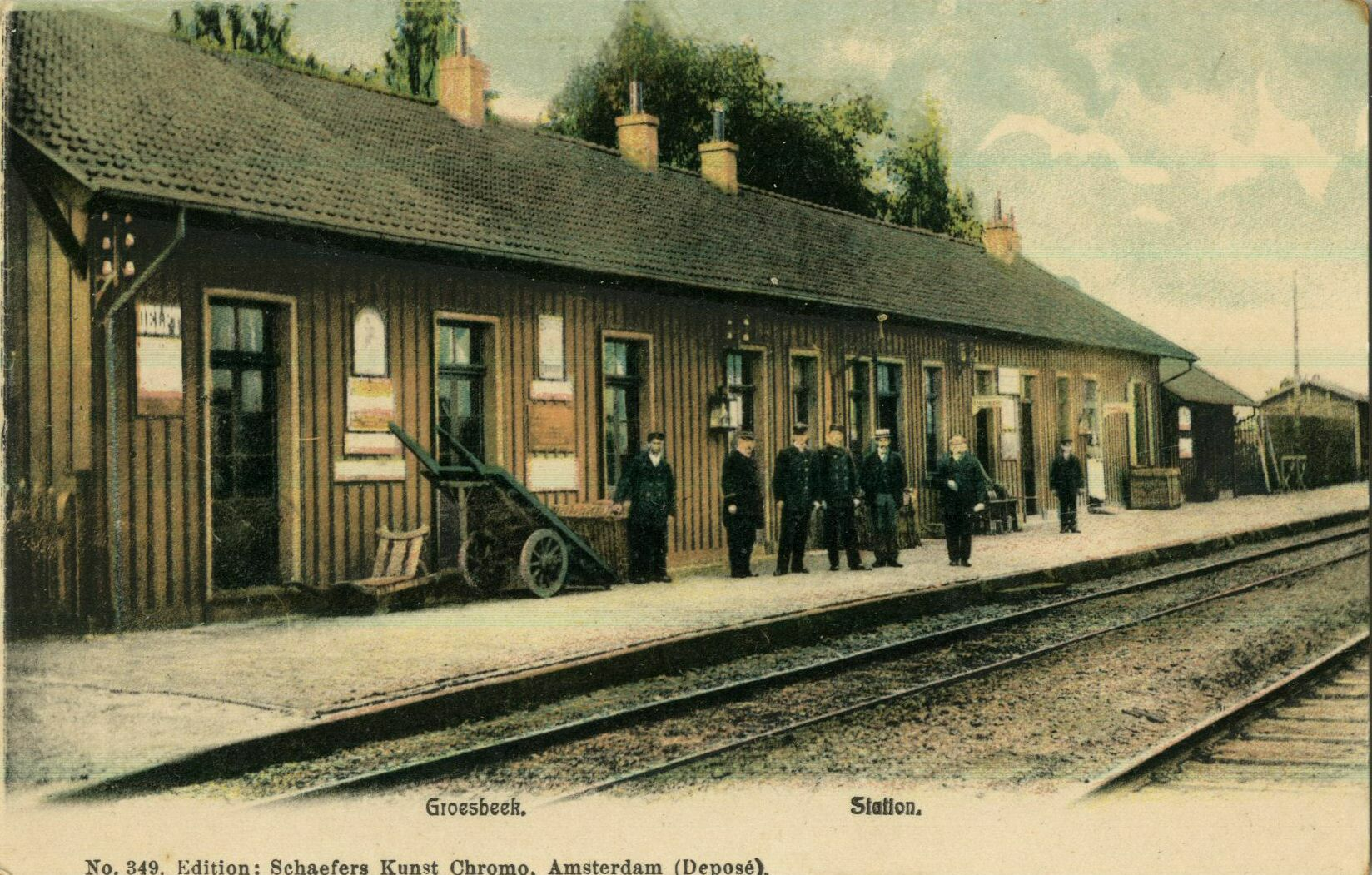 Gezicht op het N.S.M.-station Groesbeek te Groesbeek, met op het perron het stationspersoneel.